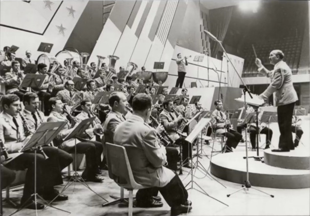 Vojaški orkester Ljubljana na koncertnem odru z dirigentom Pavlom Brzuljo in solistom Tonetom Grčarjem na trobenti.